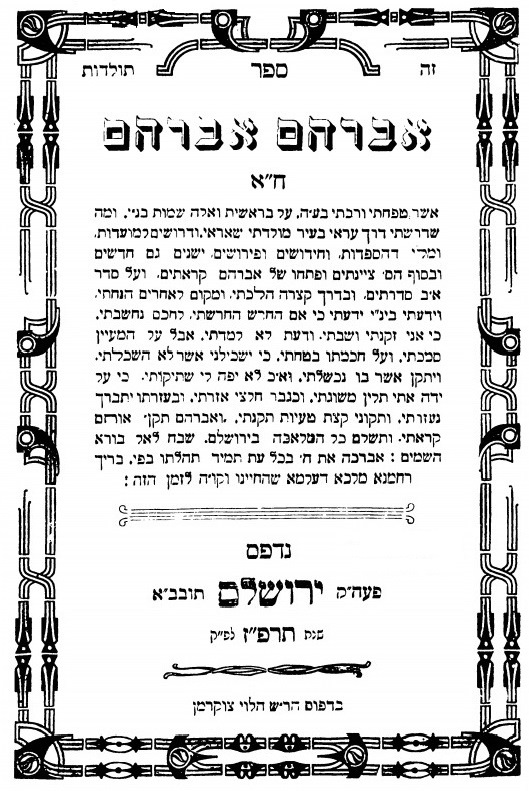 שער הספר "אברהם אברהם" מאת רבי אברהם בן יעקב רומנו (המכונה "מירקאדו")